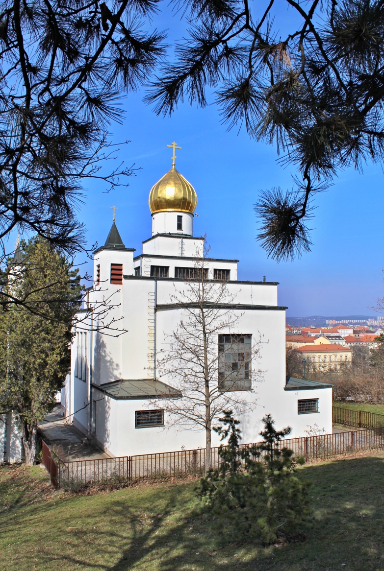 Pravoslavný chrám sv. Václava v Brně